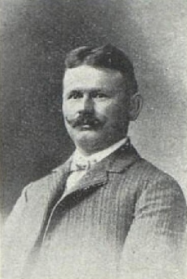 Jan Kotlant (1867-1947), rakouský a český statkář a politik